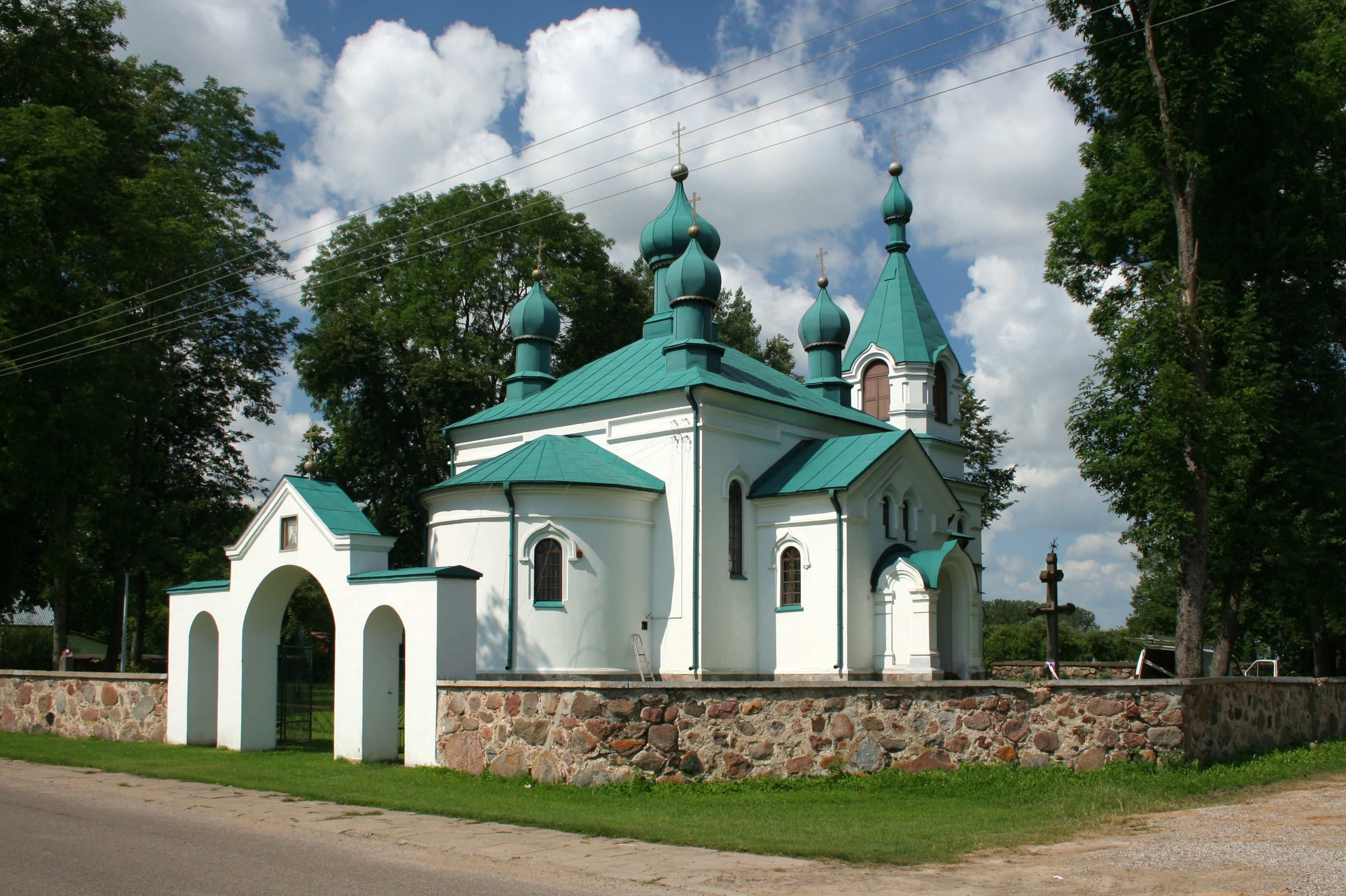 Cerkiew Wniebowstąpienia Pańskiego w Nowoberezowie.